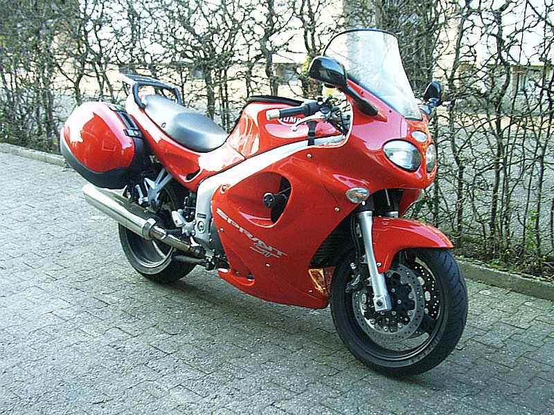 Beschreibung: Triumph Sprint ST (Motorrad) Quelle: eigenes Foto Fotograf / Zeichner: Andreas Kortemeier Andere Versionen: keine